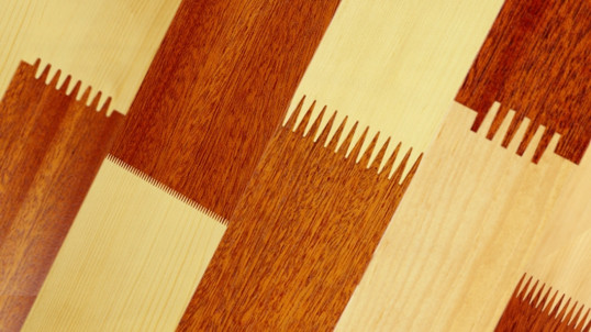 Verschiedene Arten von Keilzinkenprofile mit unterschiedlichen Holzarten